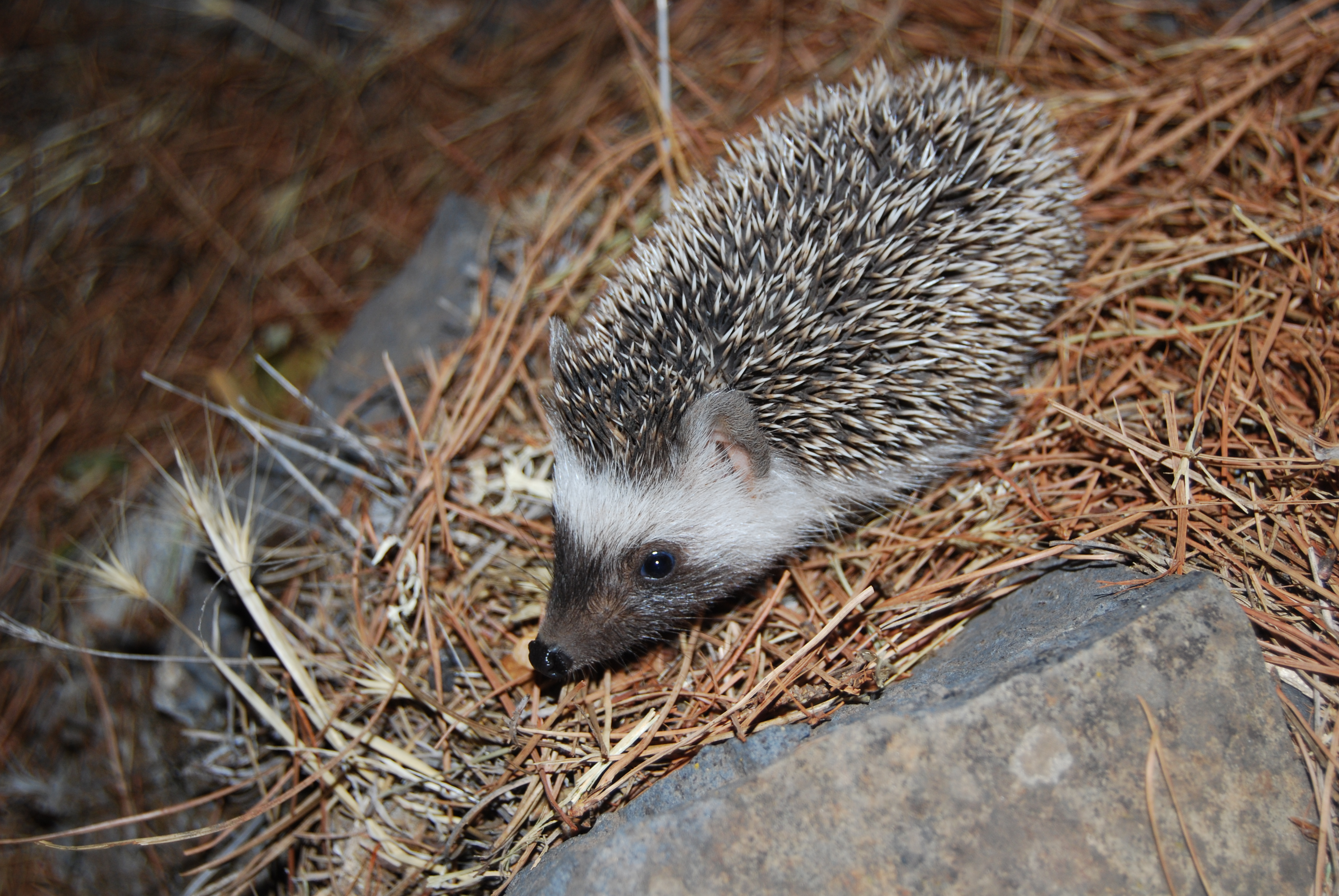 Erizo moruno fotografiado en la cumbre de Gran Canaria